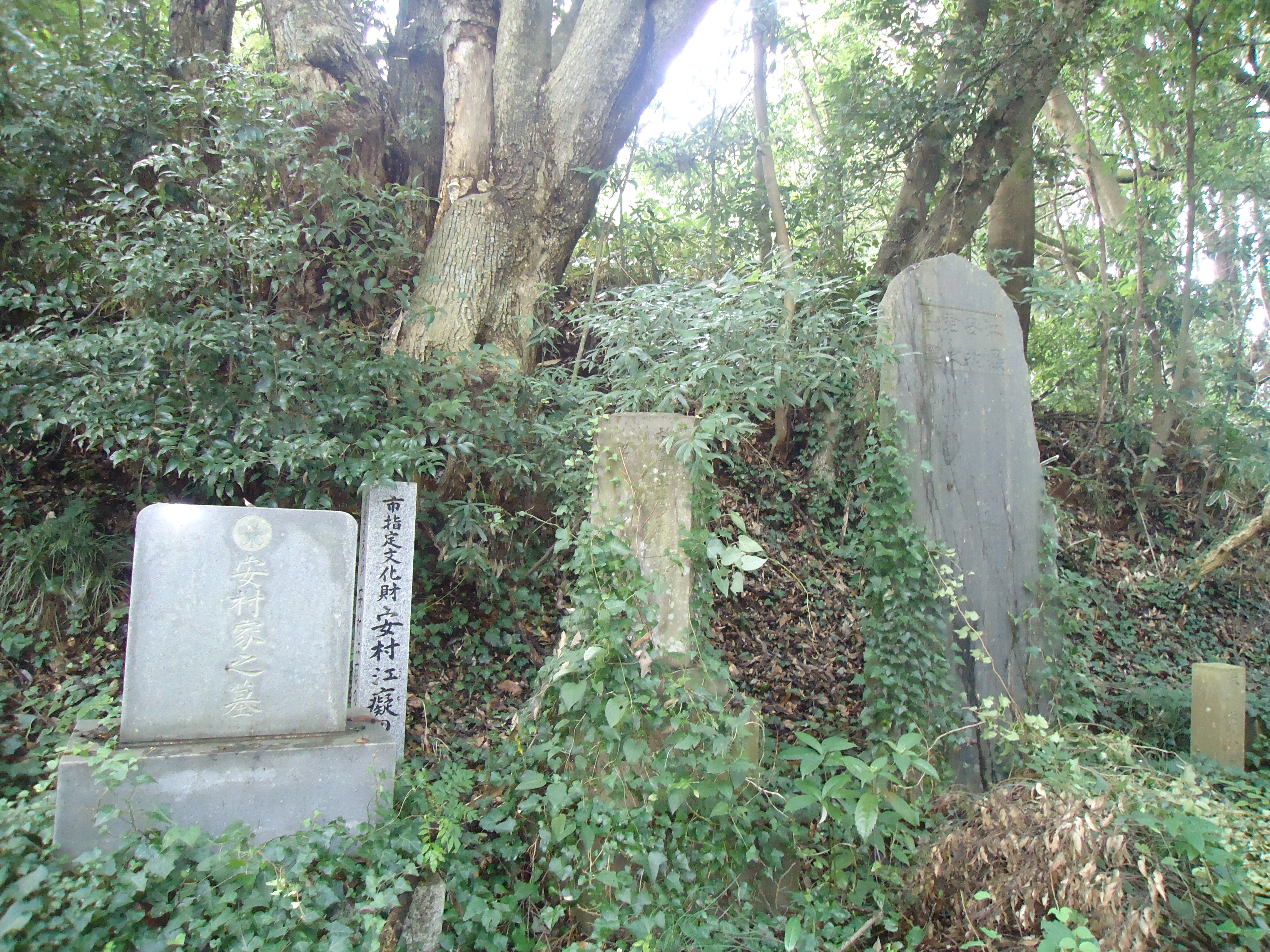 市指定史跡の安村江痴の墓